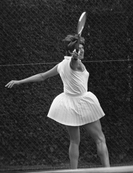 Internationale tenniskampioenschappen in Hilversum ( t Melkhuisje ); Margaret Court in aktie